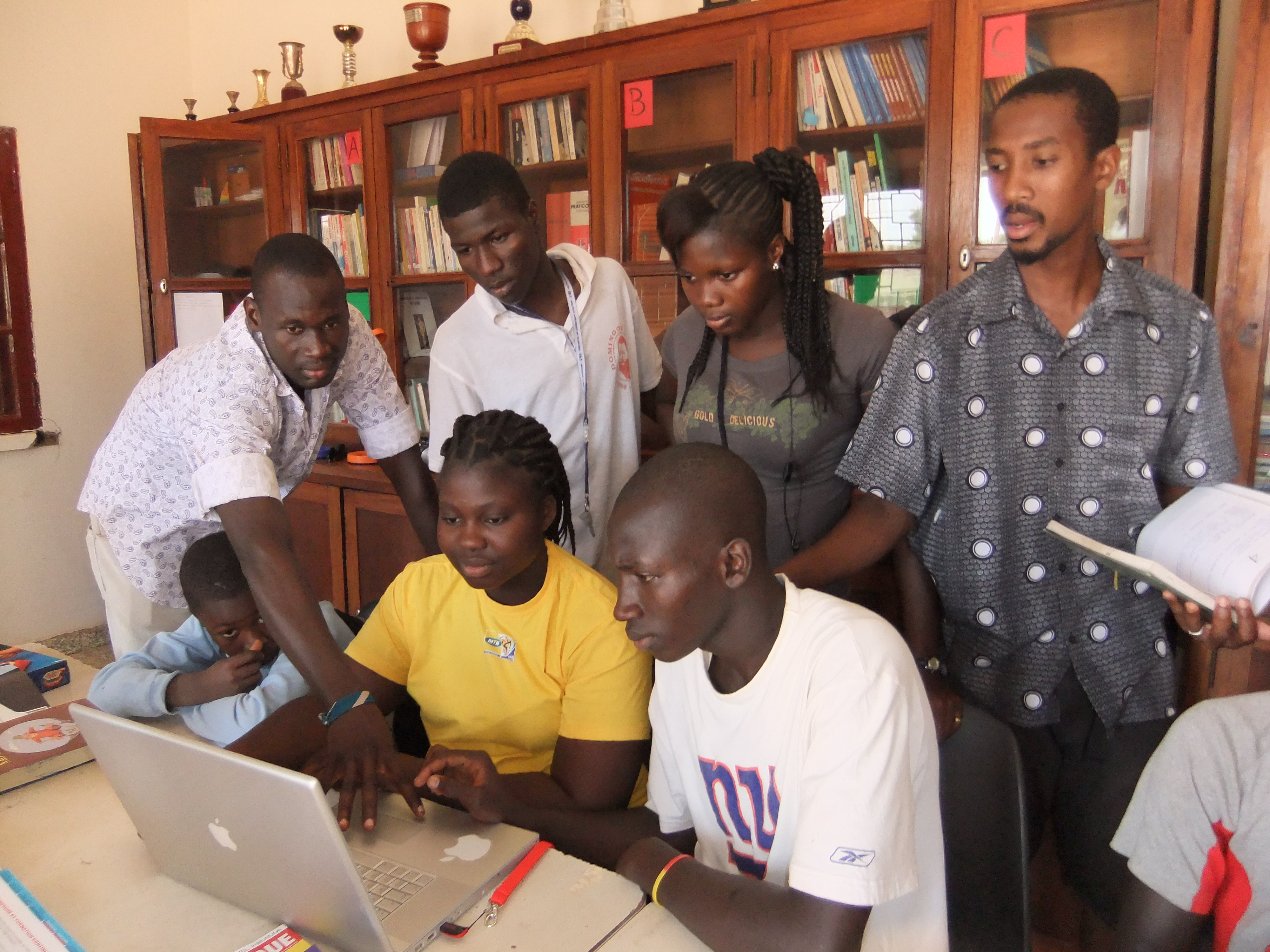 Biblioteca Jovem, Bairro de Ajuda, Bissau